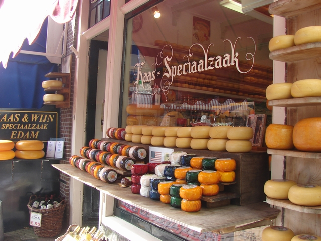 Nedersaksies: Edam keeze